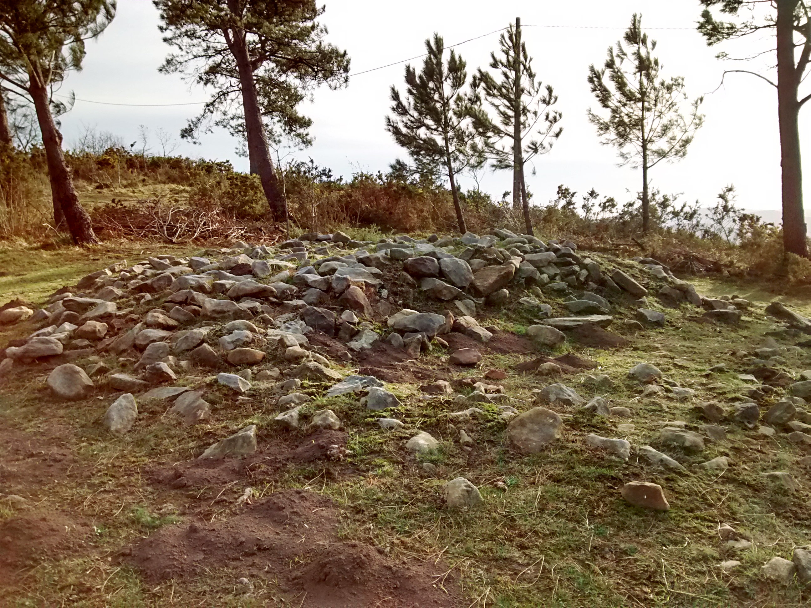 Tontortxiki IV tumulua